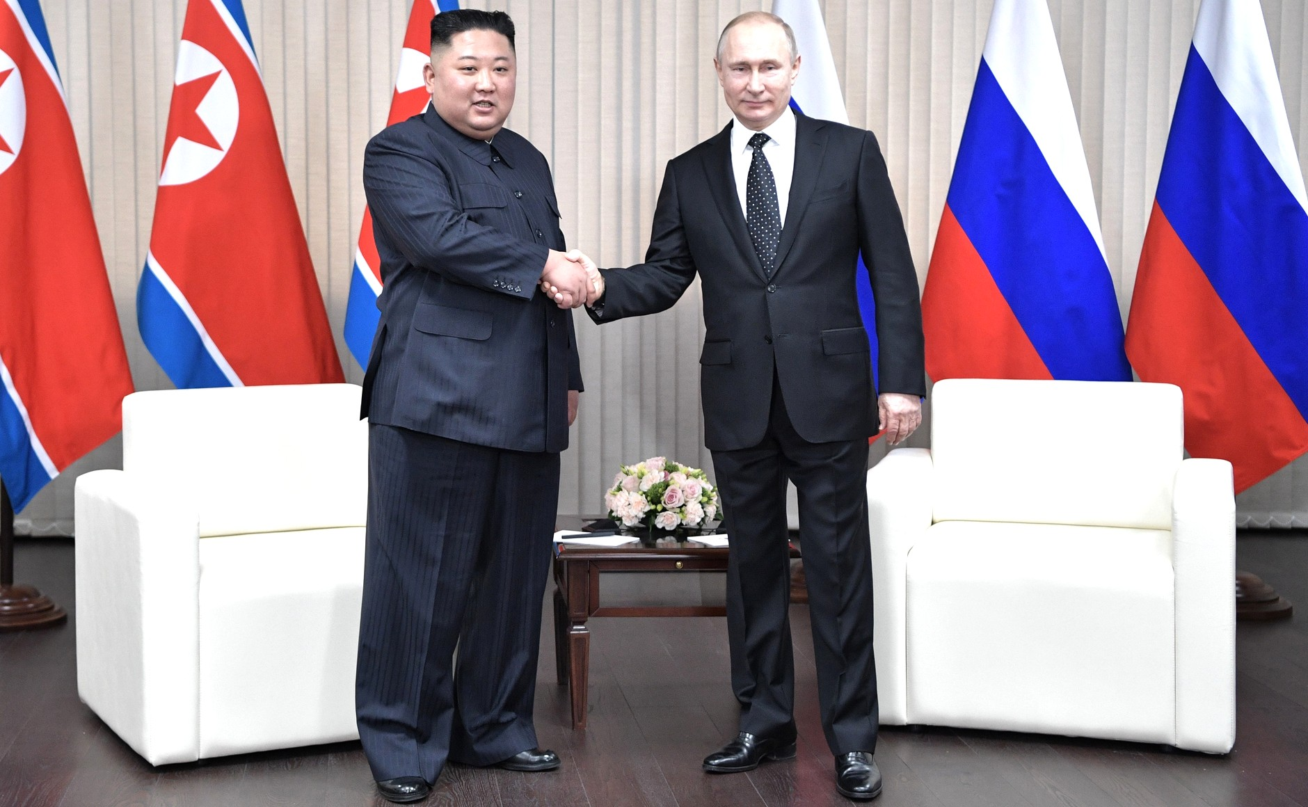 Переговоры Президента Российской Федерации Владимира Путина с Председателем Государственного совета Корейской Народно-Демократической Республики Ким Чен Ыном. Россия, Владивосток, остров Русский.